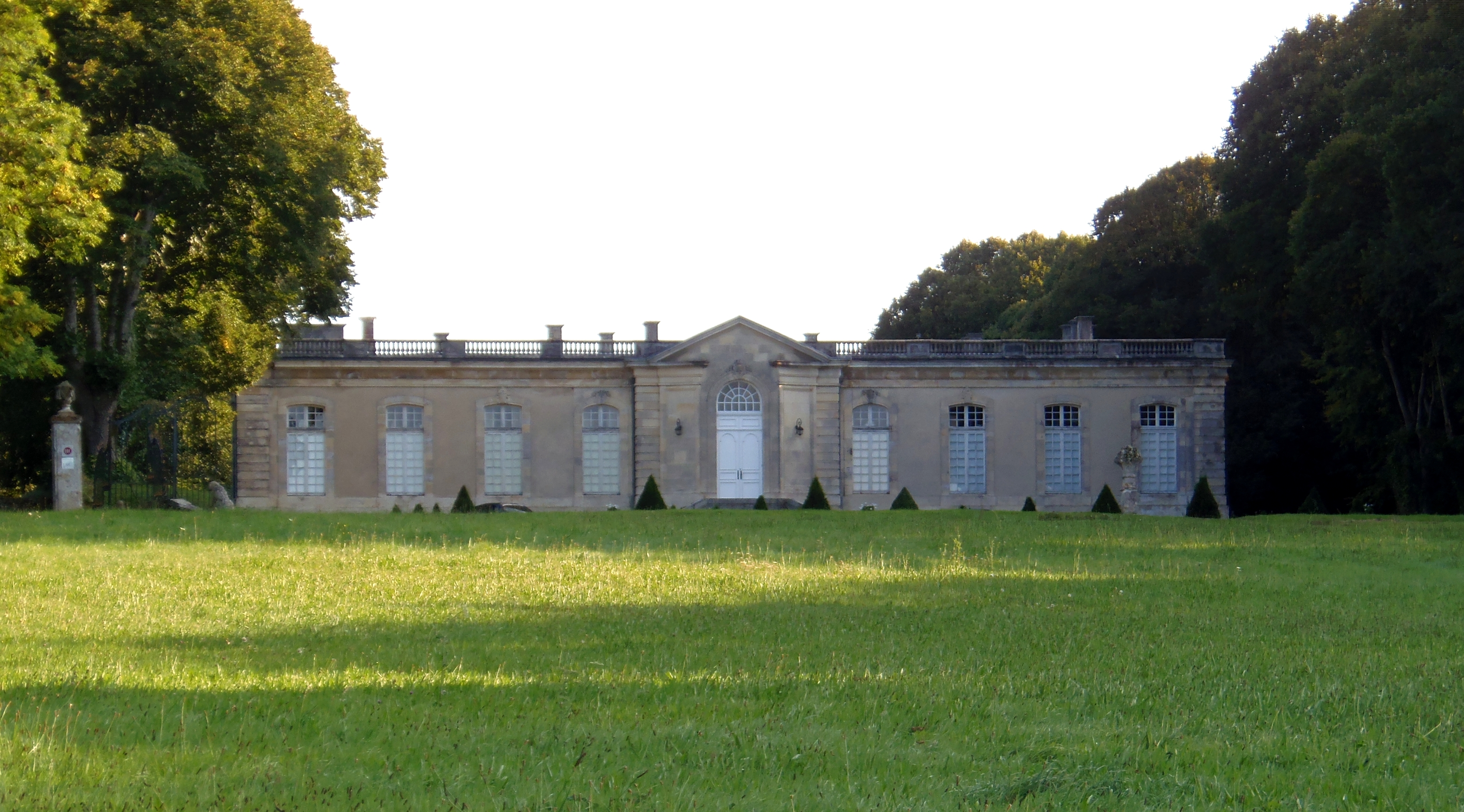 Juvigny-sur-Seulles (Normandie, France). Le château.